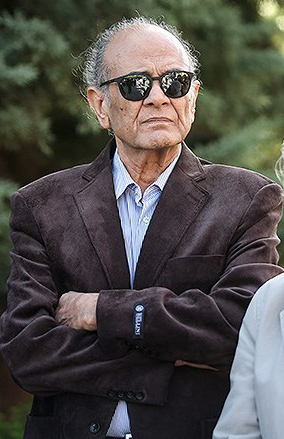 غلامعلی افشاریه ۲۲ شهريور ۱۳۹۷